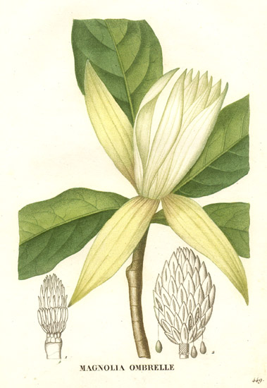 Magnolia tripetala - La flore et la pomone françaises, ou histoire et figures en couleur, des fleurs et des fruits de France ou naturalisés sur le sol français by Jean Henri Jaume Saint-Hilaire. Paris, the author, 1832, volume 5 (plate 449).